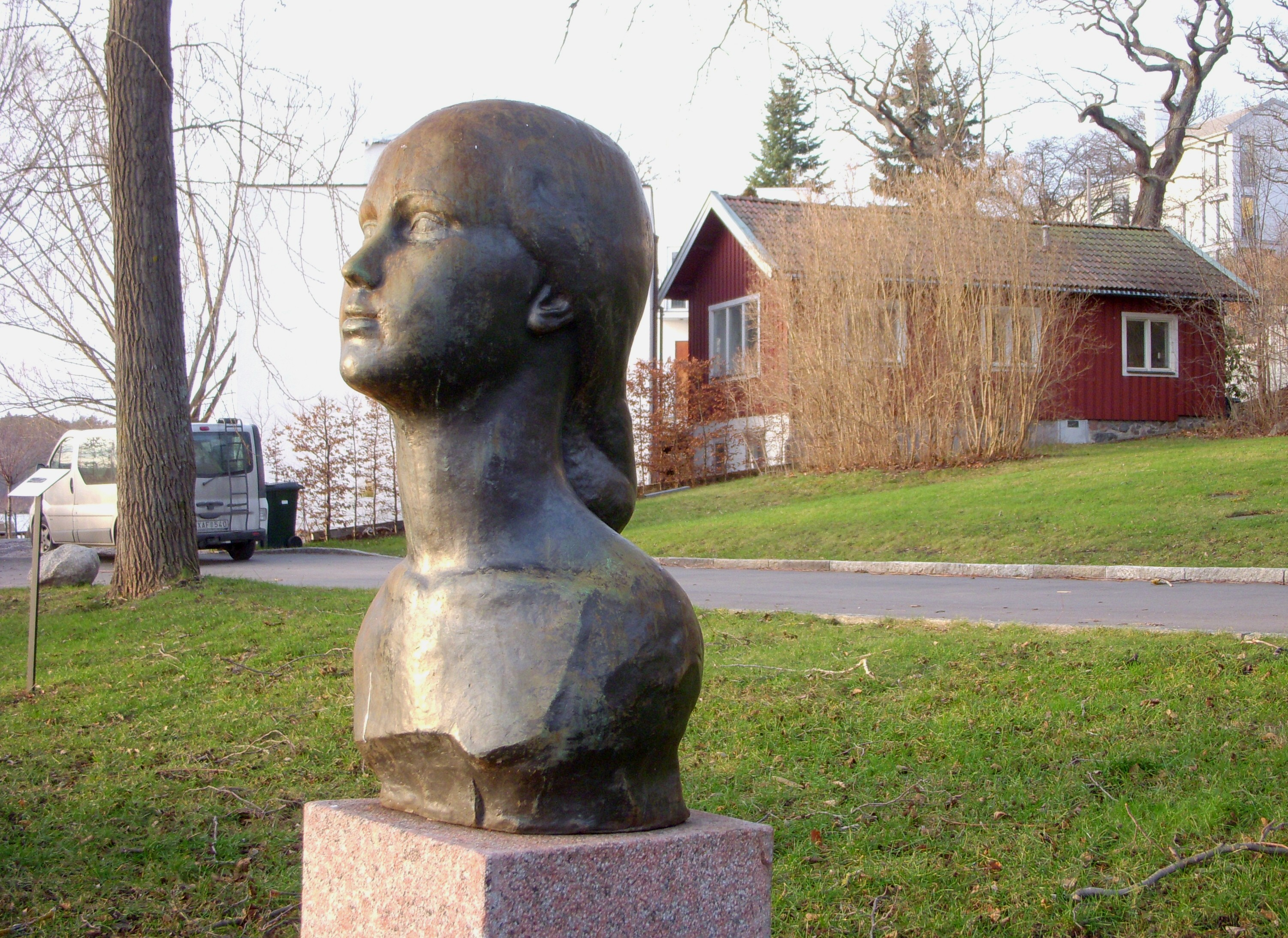 Värdshusparken med skulpturen "Vision" av Annie Wiberg på Stora Essingen